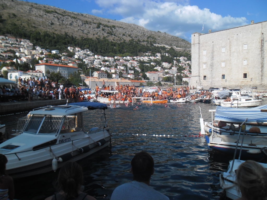 završnica Divlje lige u Portu 17. kolovoza 2014.